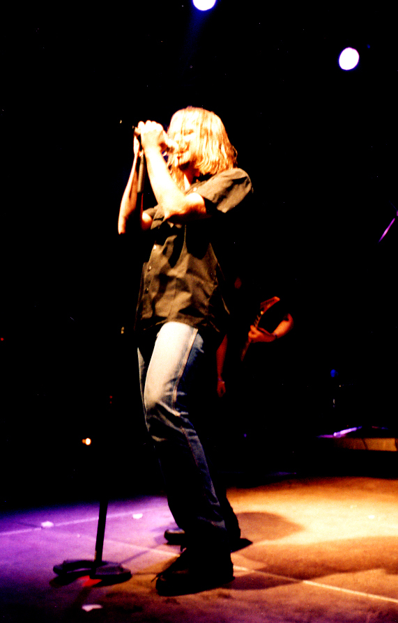 Hansi Kürsch während des letzten ANATO-Tour-Gigs in Athen Fotograf oder Zeichner: Benutzer:Gardini Datum: de:25. Oktober de:2003